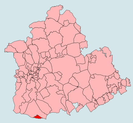 Map_of_El_Cuervo_de_Sevilla_%28Sevilla%29.png